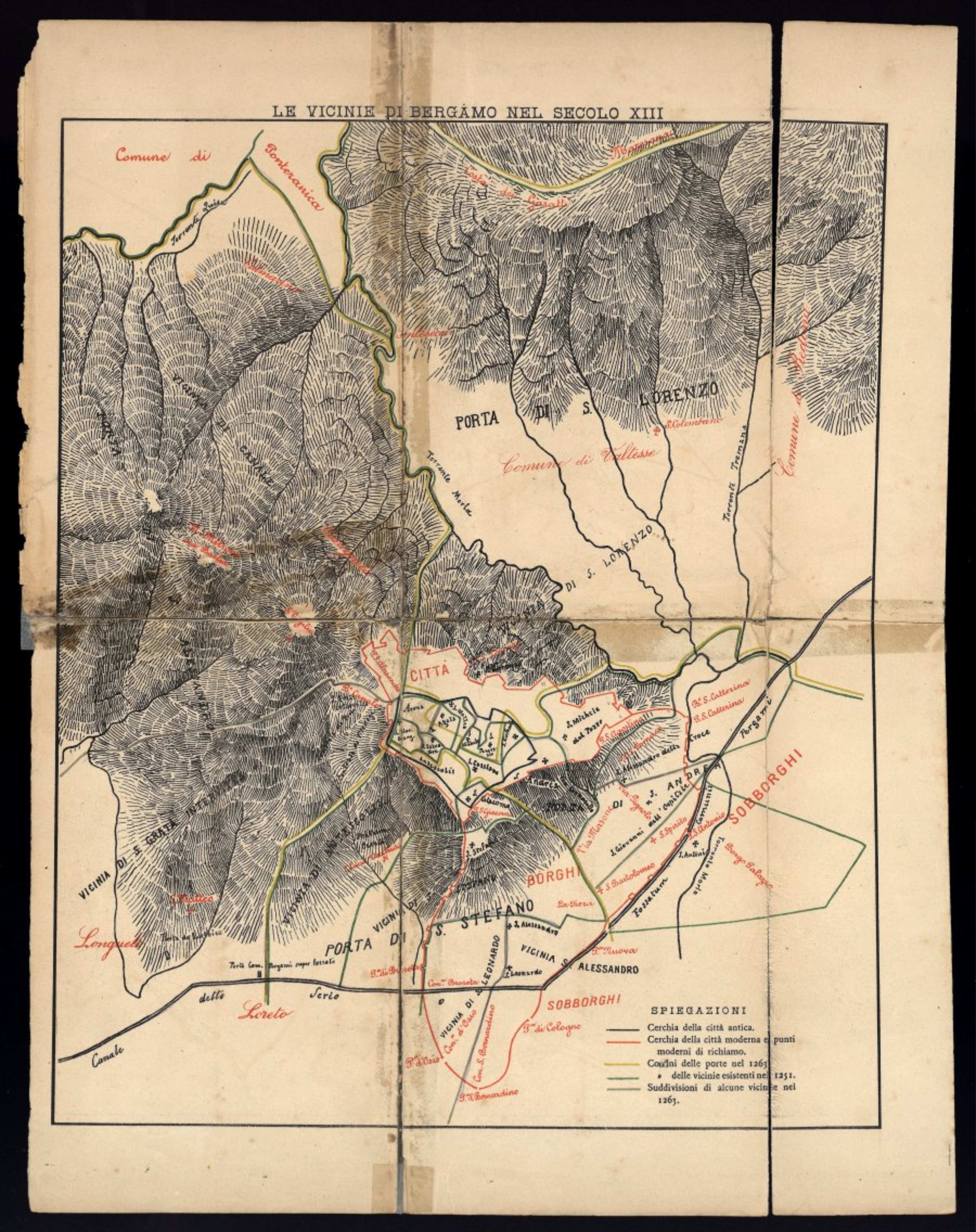 Mappa delle Vicinie di Bergamo nel XIII secolo